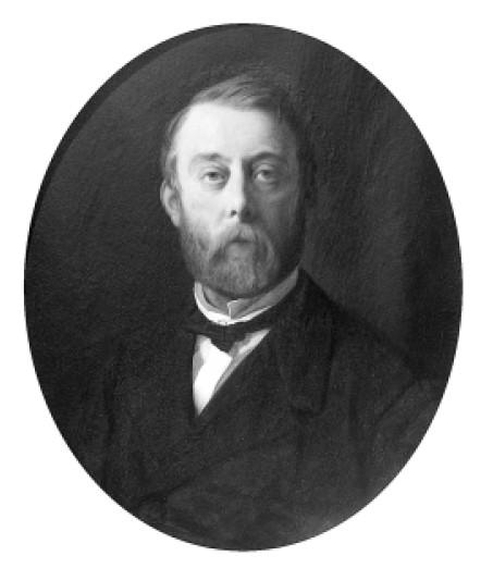 Gustav Gans zu Putlitz, 1821-1891. Indendant und Schriftsteller. Entnommen der online-Leseprobe zu: Gustav zu Putlitz, Mein Heim. Erinnerungen an Kindheit und Jugend. Neu herausgegeben und mit einem Vorwort sowie Anhang versehen von Bernhard von Barsewisch. Hendrik Bäßler Verlag, Berlin 2002 (Erstausgabe 1885) ISBN 3-930-38828-6 Da das Foto deutlich vor 1891 gemacht wurde, sind etwaige Urheberrechte abgelaufen. Eingestellt im Juli 2005 von Lienhard Schulz